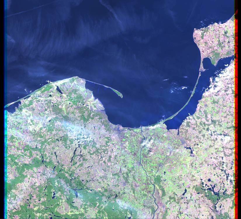 Okolice Gdańska - zdjęcie satelitarne Landsat